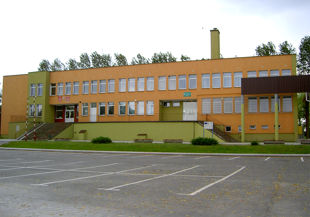 Potok Górny, Poland • Urząd Gminy / Commune Council